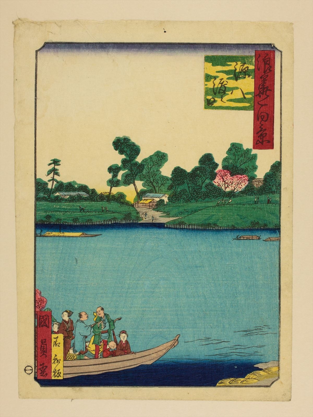 1800年代。歌川國員/画。浪花百景 102枚のうちの1枚。大阪市立中央図書館蔵。